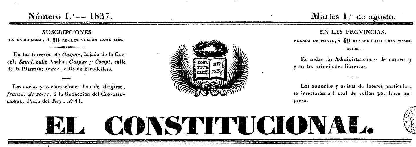 Cabecera del periódico "El Constitucional" publicado en Barcelona entre 1837 y 1843